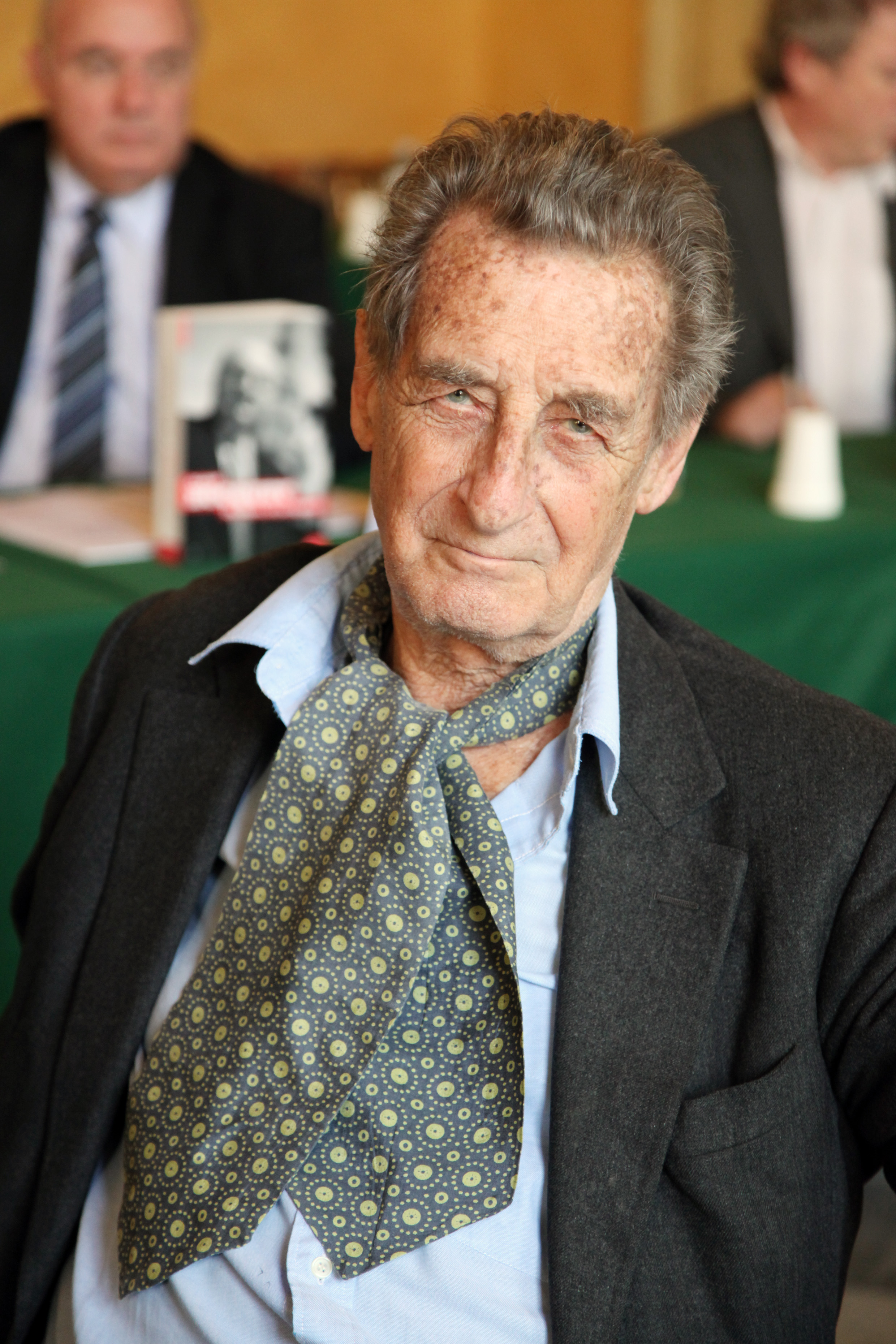 Jean Lacouture le 10 avril 2010 lors de la 19e Journée du livre politique organisée par l'Assemblée nationale.